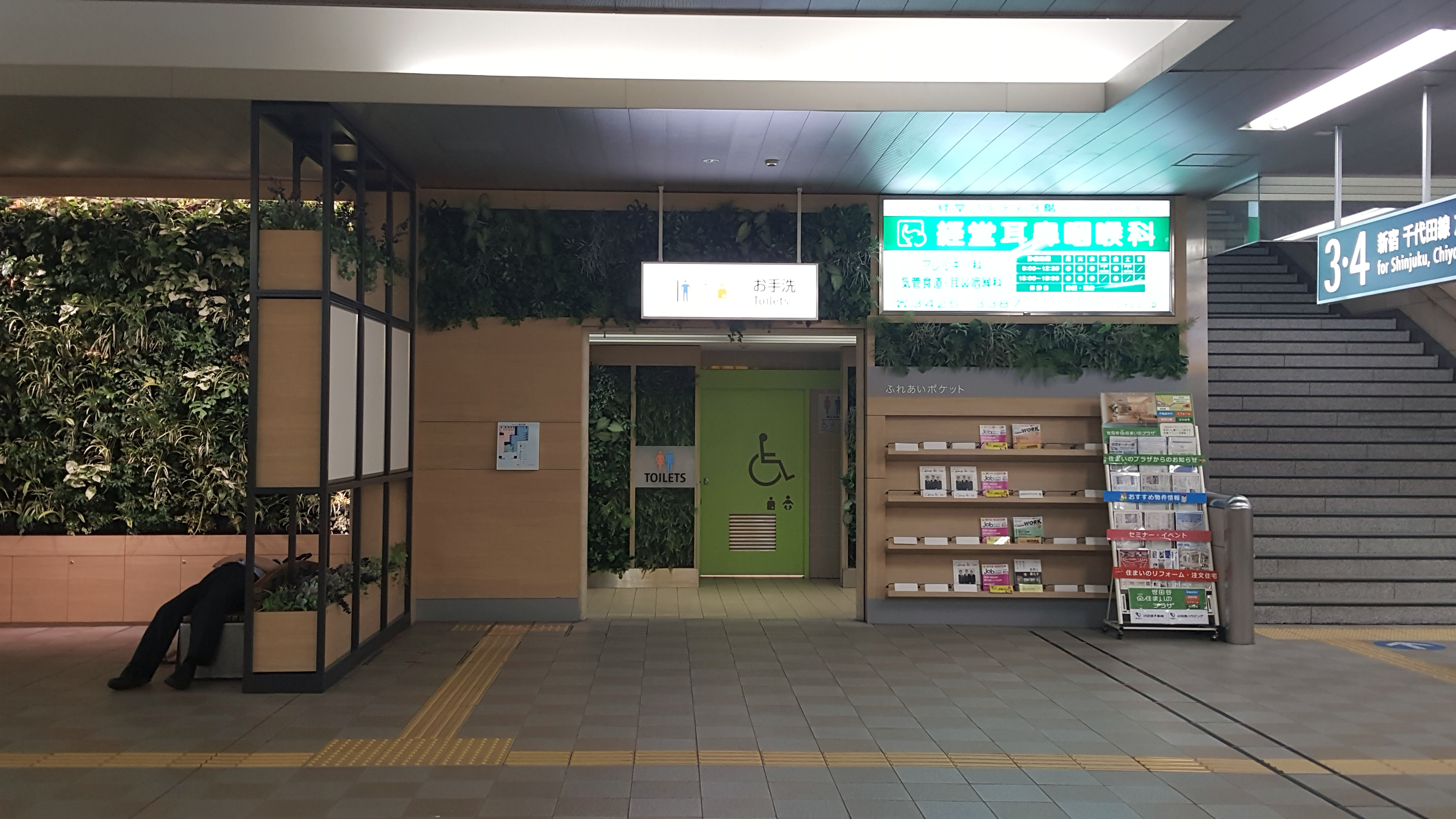 経堂駅構内